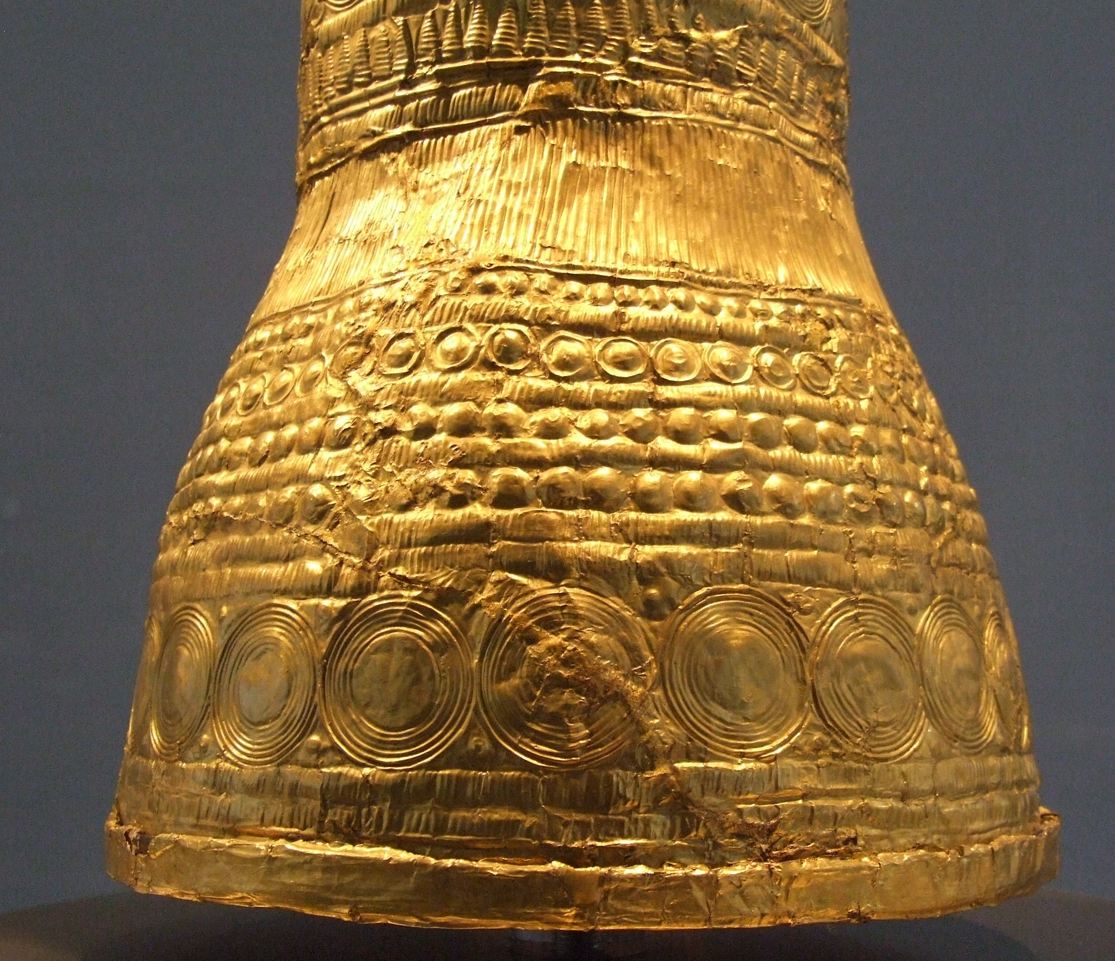 Goldblechkegel von Ezelsdorf-Buch - 5 - Basis, Germanisches Nationalmuseum ( Nürnberg / Deutschland ), Urnenfelder Kultur, 11.-9.Jhdt. v.Chr. - Detail.